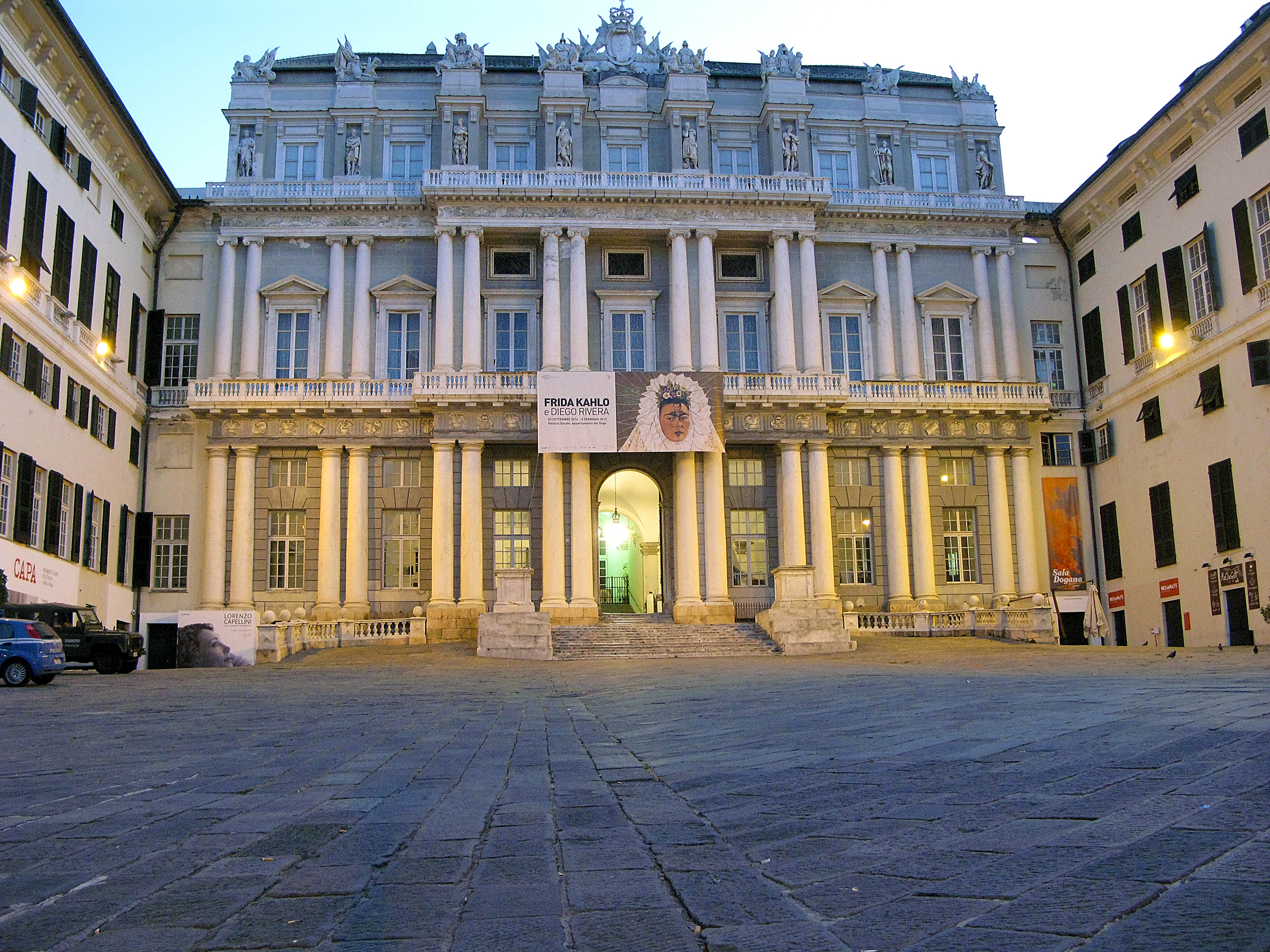 Palazzo Ducale di Genova This is a photo of a monument which is part of cultural heritage of Italy.